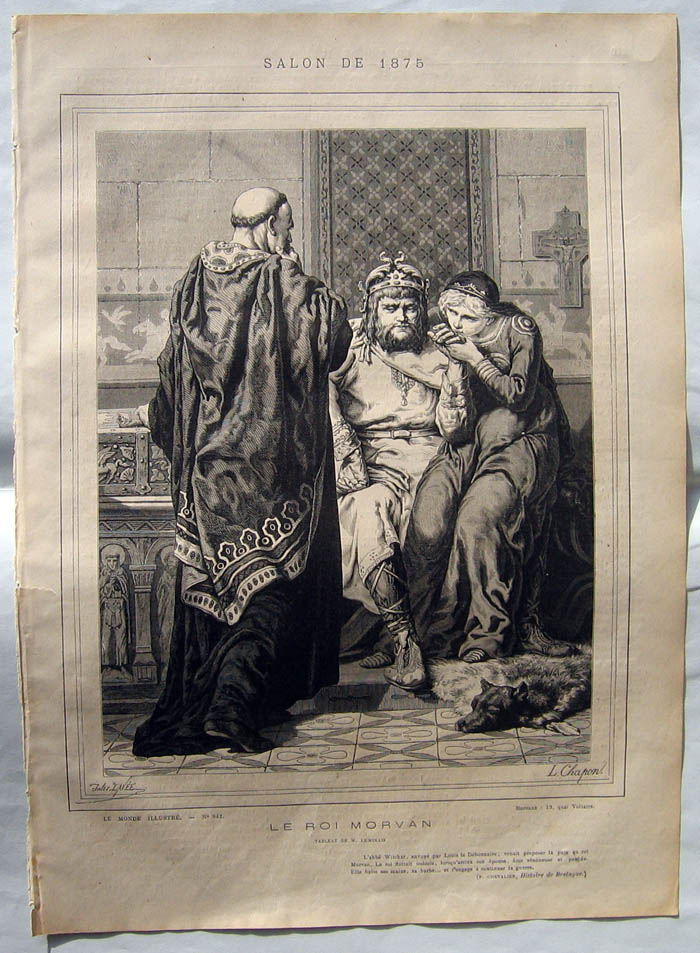 Le roi Morvan par Evariste-Vital Luminais. Le Monde Illustré, 1875.